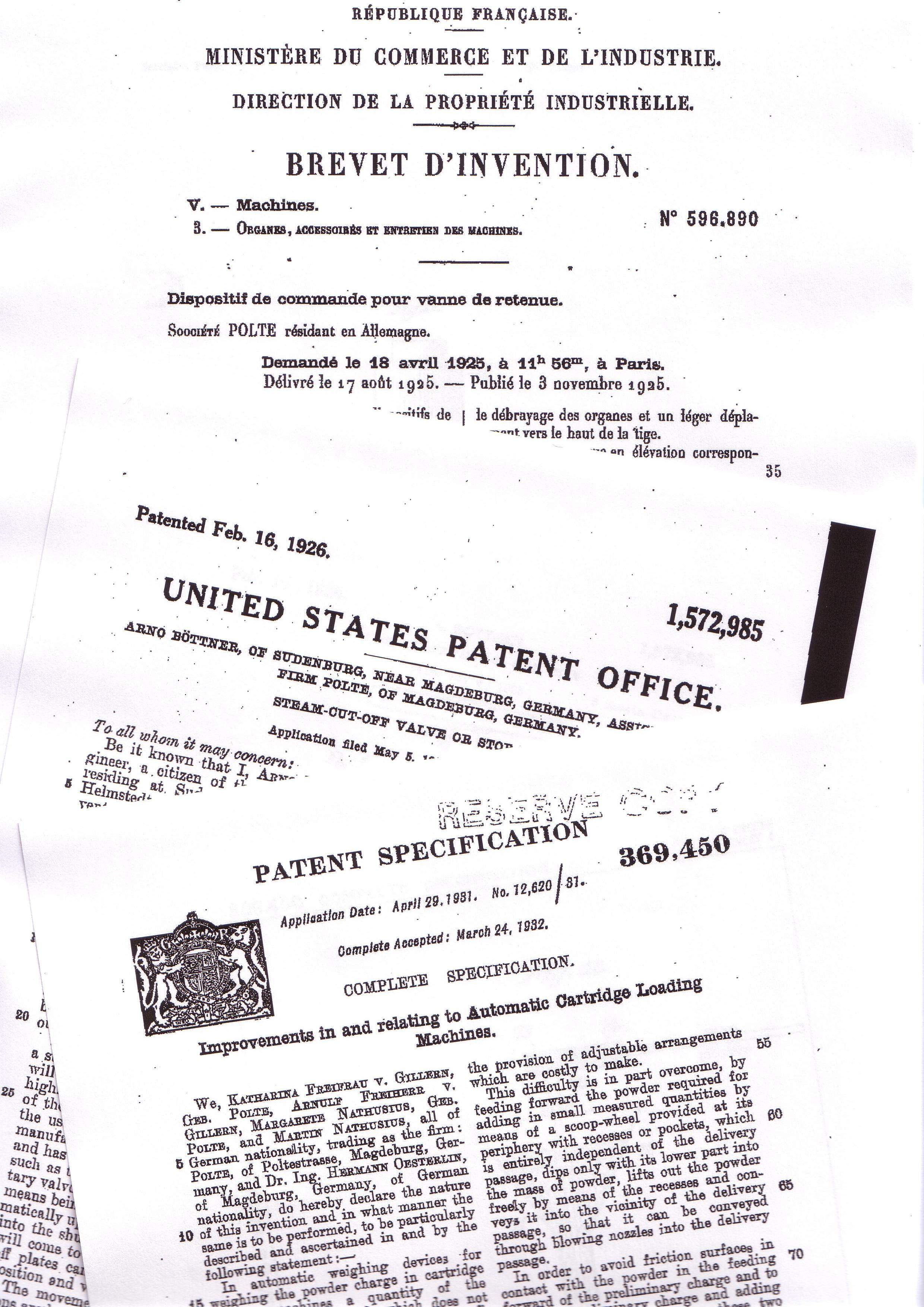 Drei internationale Patente der Firma Polte OHG